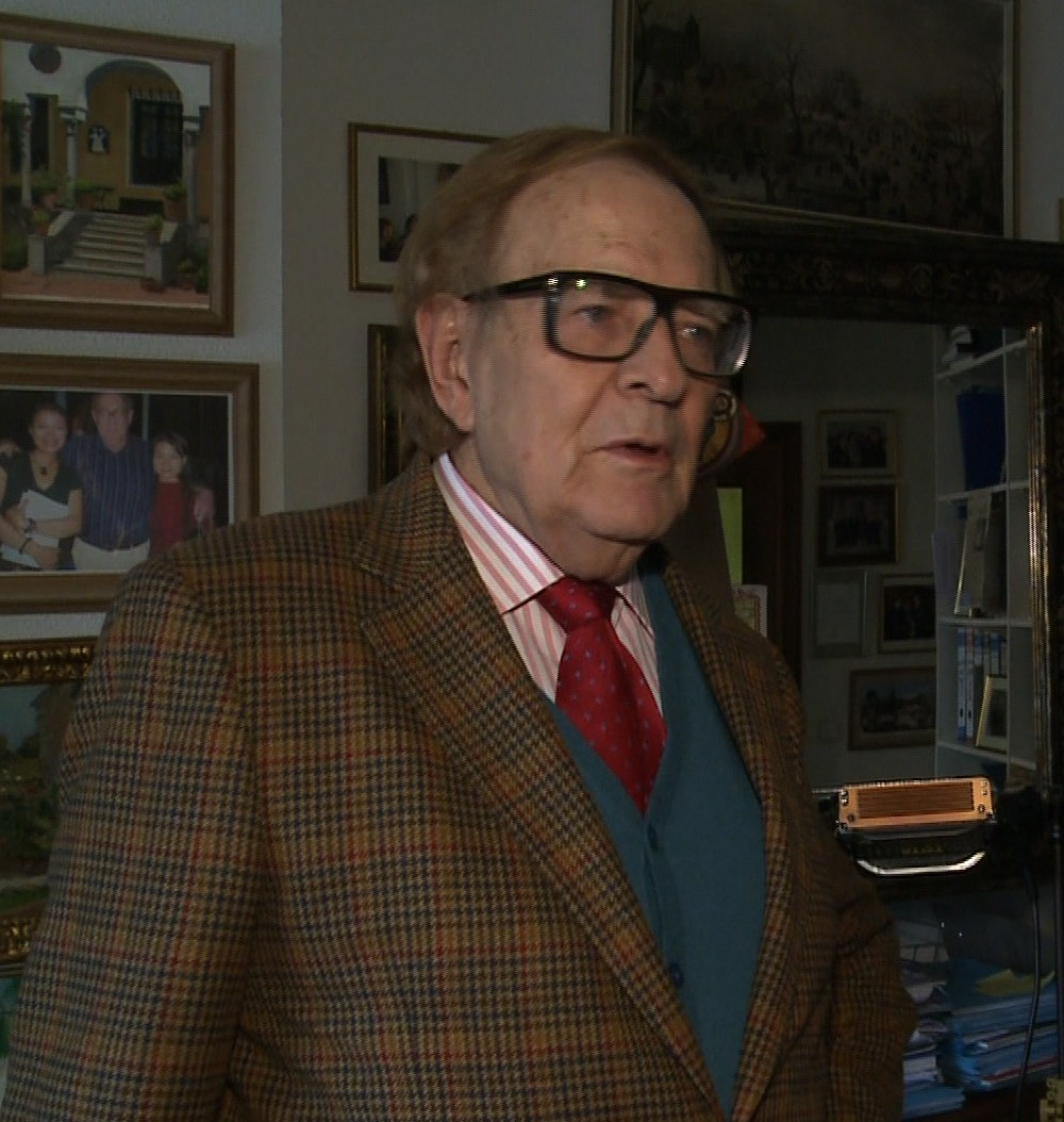 Ramón Tamames (izquierda)